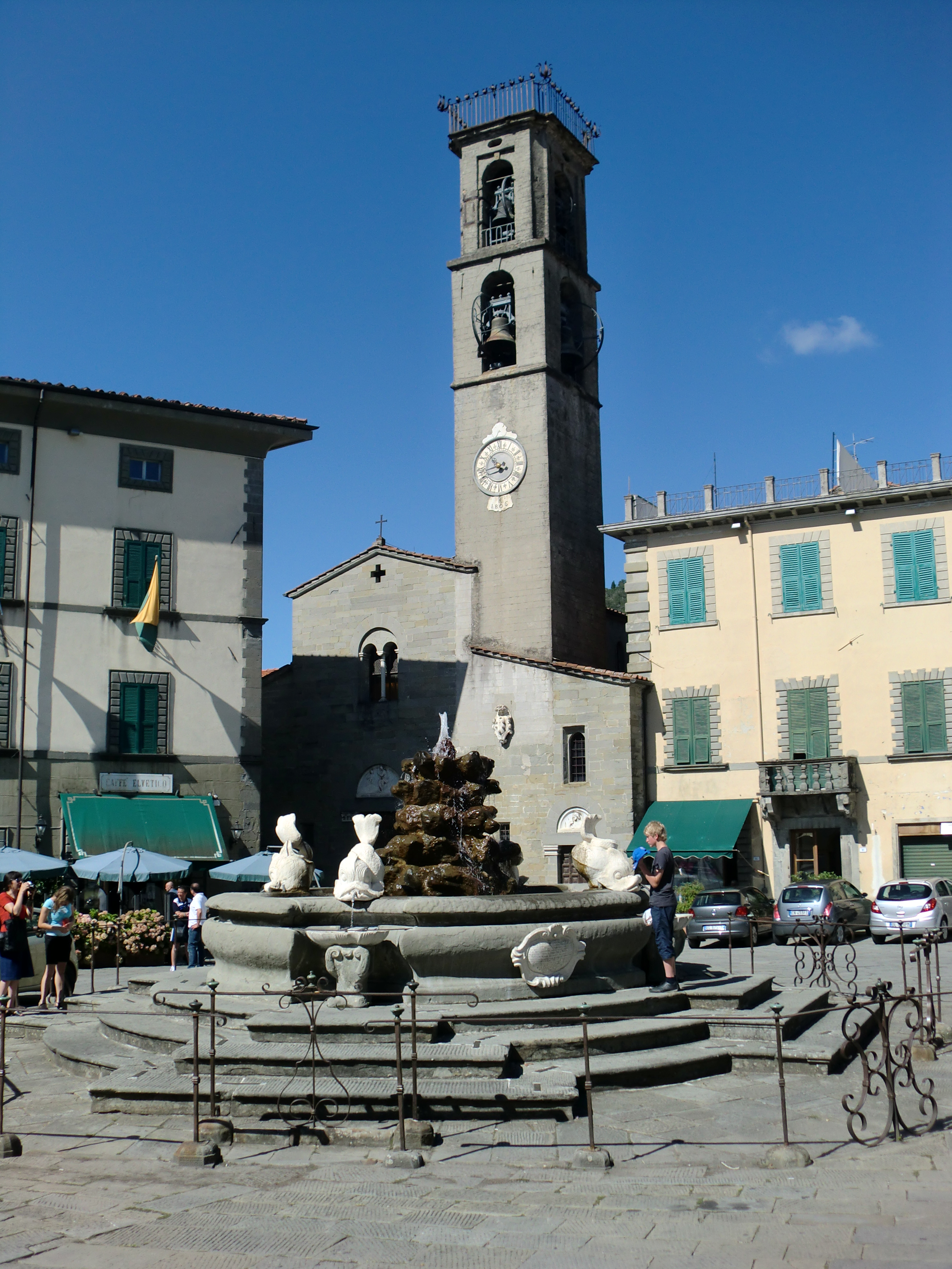 Fivvizano market